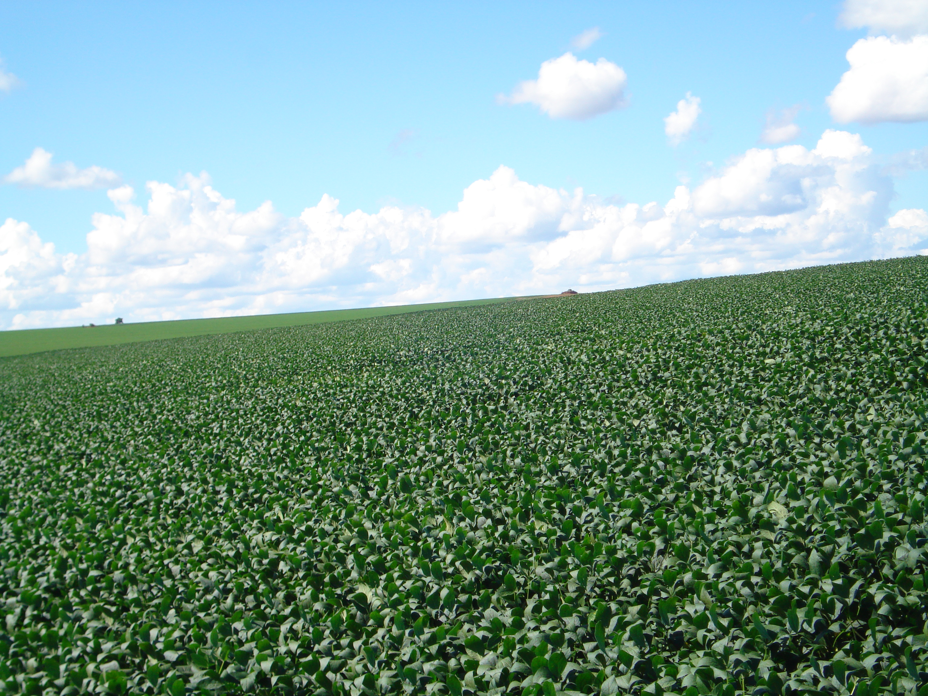 Plantação de soja